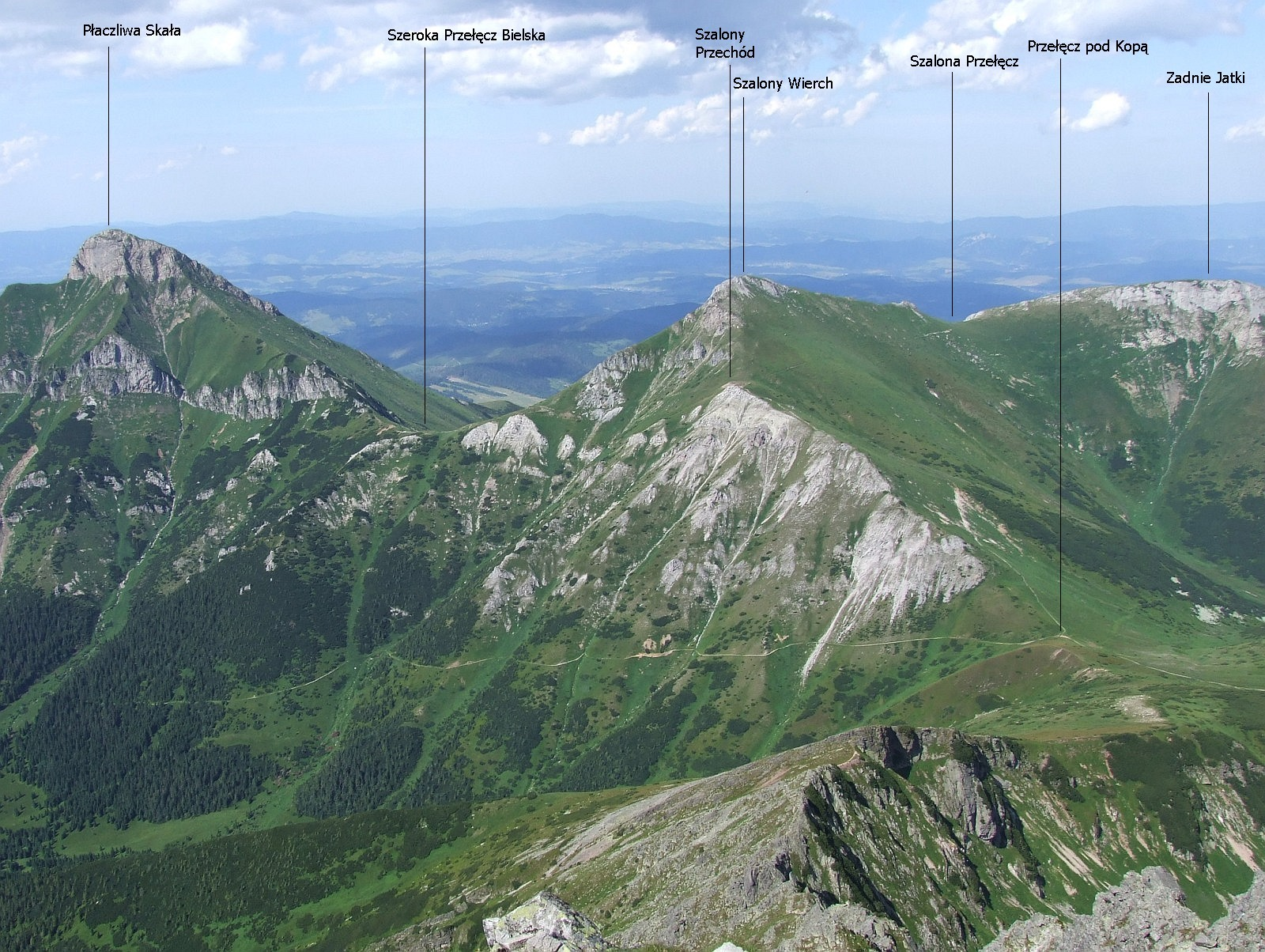 Widok z Jagnięcego Szczytu na Tatry Bielskie